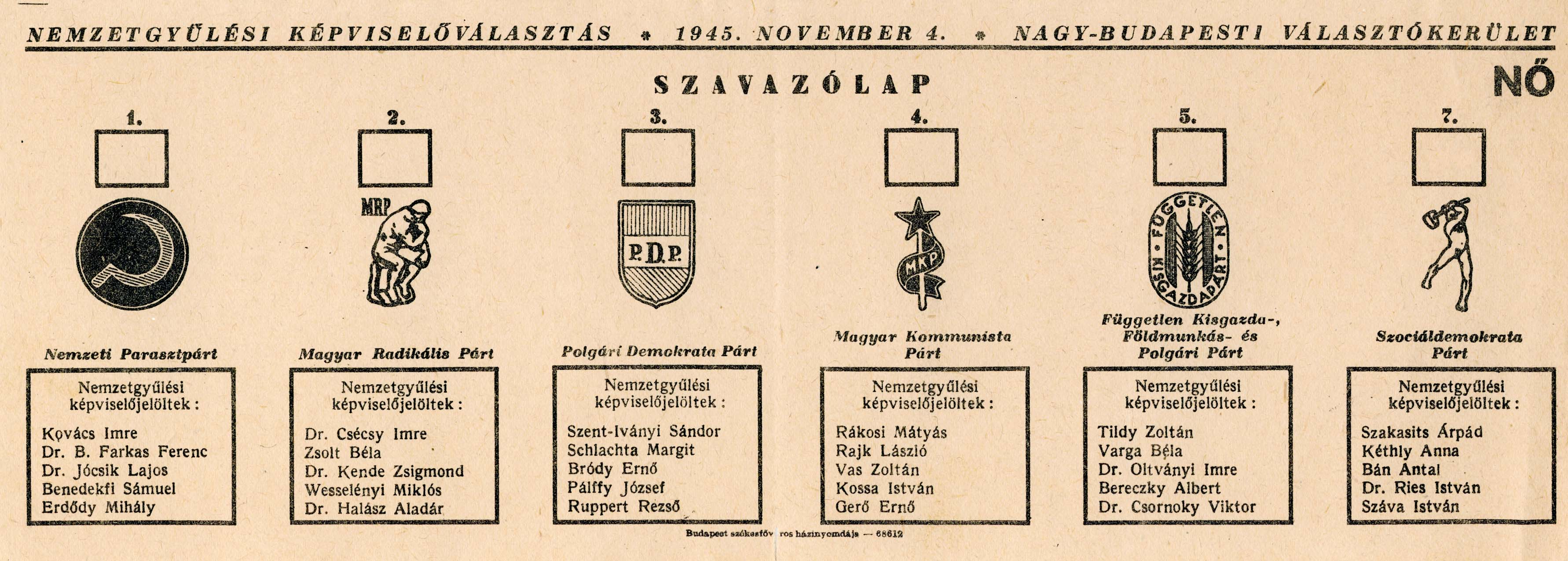 Nemzetgyűlési képviselő-választás budapesti szavazólapja 1945. november 4-én